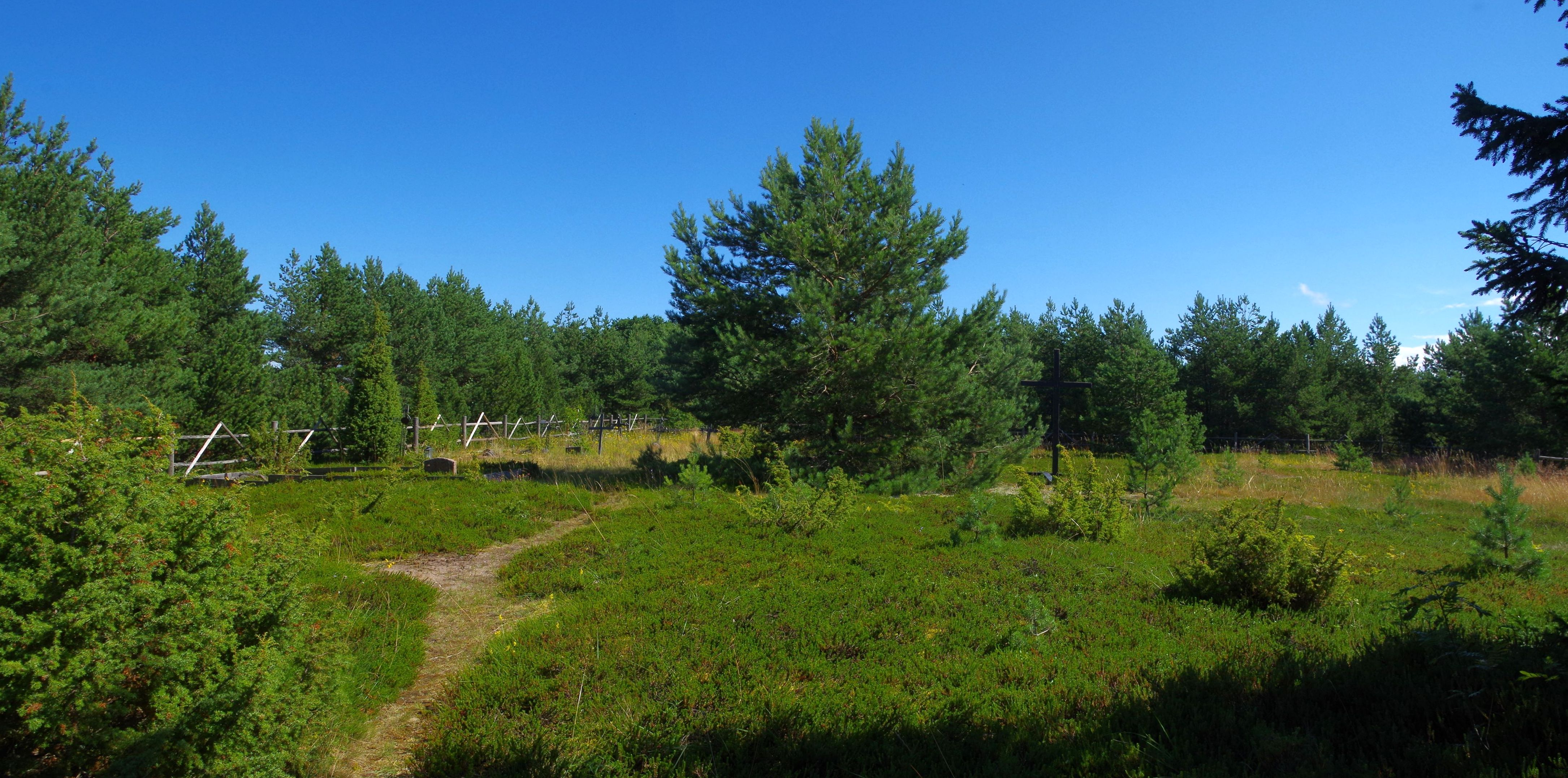 Rammu saare kalmistu